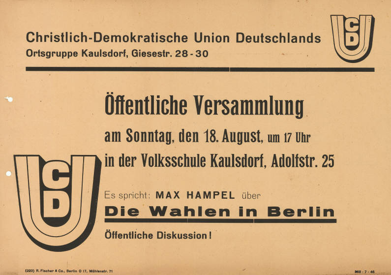 Christlich-Demokratische Union Deutschlands Ortsgruppe Kaulsdorf ... Öffentliche Versammlung ... Es spricht: Max Hampel über Die Wahlen in Berlin Öffentliche Diskussion! Abbildung: CDU-Logo Plakatart: Ankündigungsplakat Auftraggeber: OG Kaulsdorf Drucker_Druckart_Druckort: (223) R. Fischer & Co., Berlin O 17 362 - 7 - 46 Objekt-Signatur: 10-004 : 4 Bestand: Plakate zu Abgeordnetenhauswahlen Berlin (10-004) GliederungBestand10-18: Plakate zu Abgeordnetenhauswahlen Berlin (10-004) » CDU Lizenz: KAS/ACDP 10-004 : 4 CC-BY-SA 3.0 DE